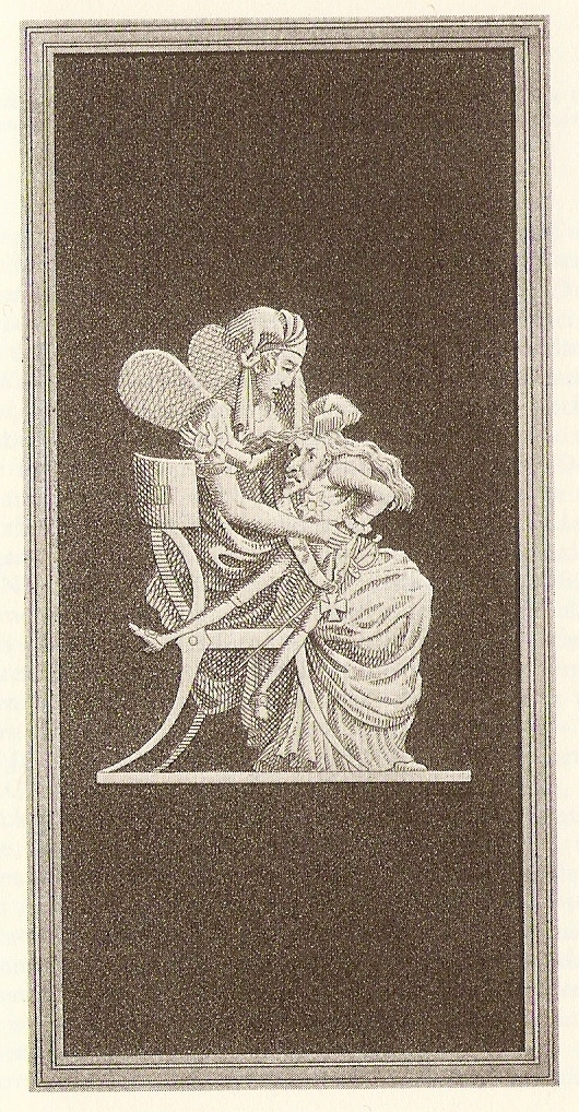 Zinnober als Minister auf dem Schoß der guten Fee Rosabelverde Kupferstich von Carl Friedrich Thiele (1780-1836) für den Umschlag der Erstausgabe von "Klein Zaches genannt Zinnober" von E.T.A. Hoffmann nach einer Zeichnung Hoffmanns.